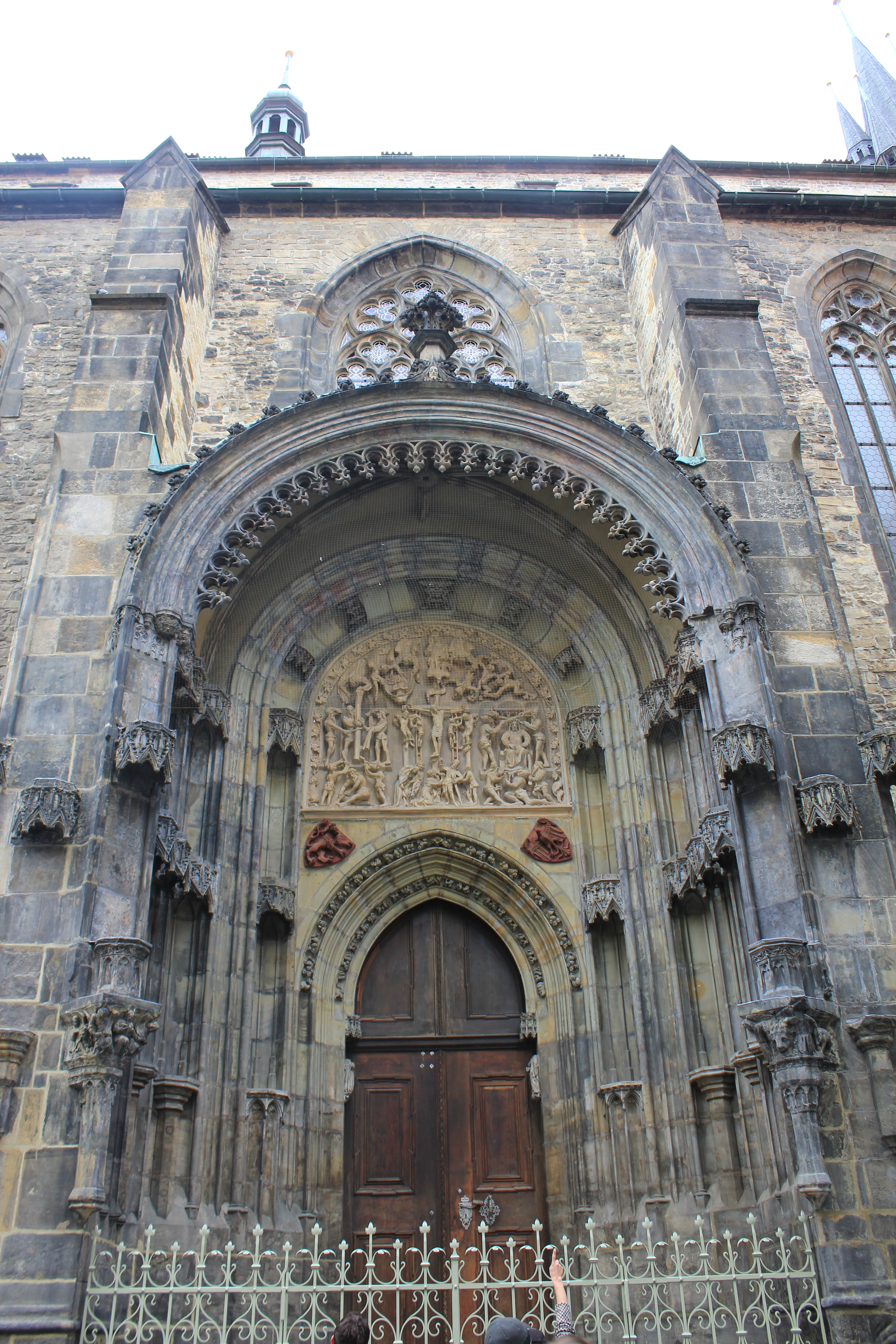 sideinngang til Tyn-kirken